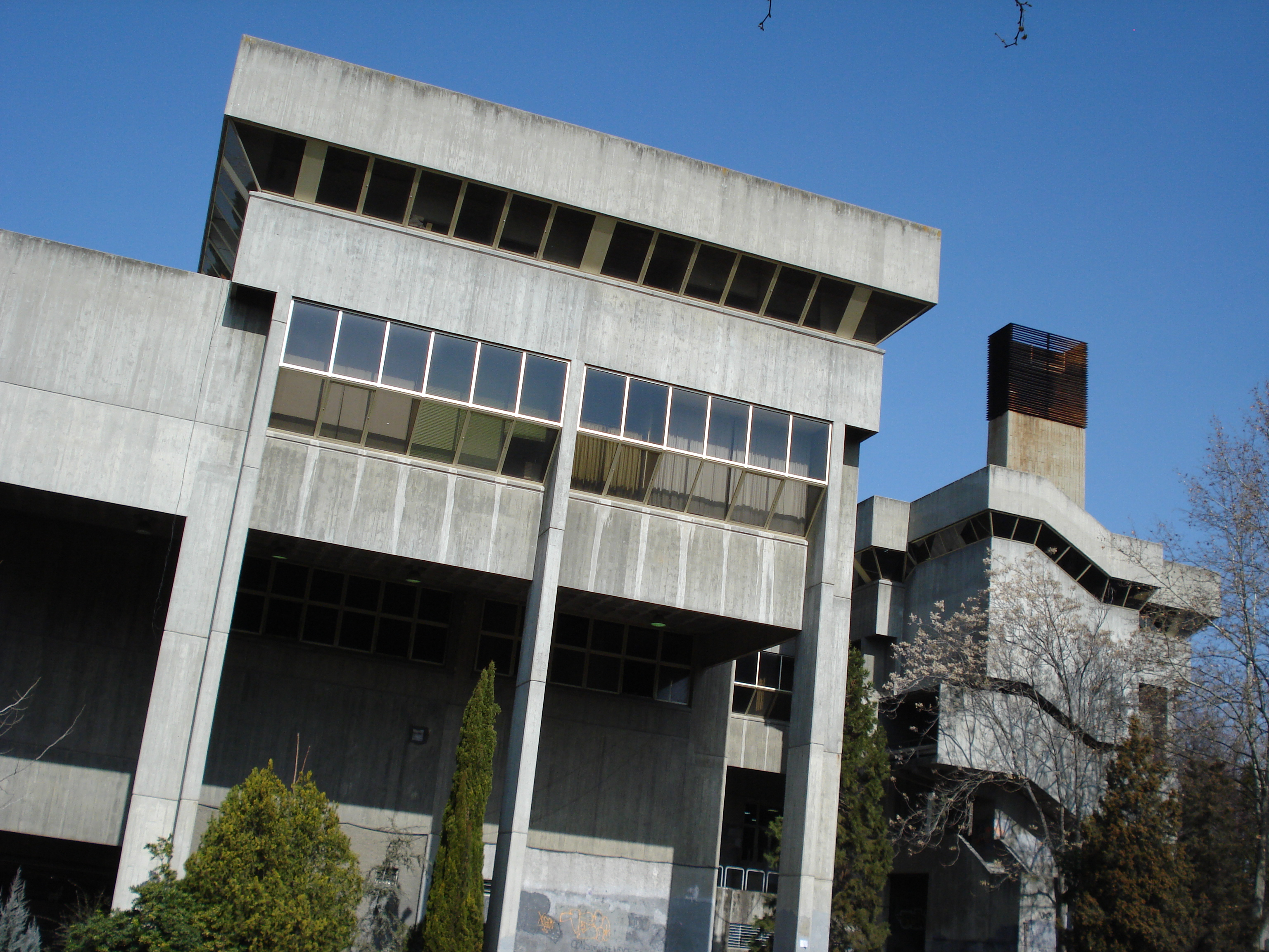 Existe una leyenda urbana que atribuye el diseño de la facultad a una cárcel de mujeres en una república de África. Desde luego es poco acogedora.